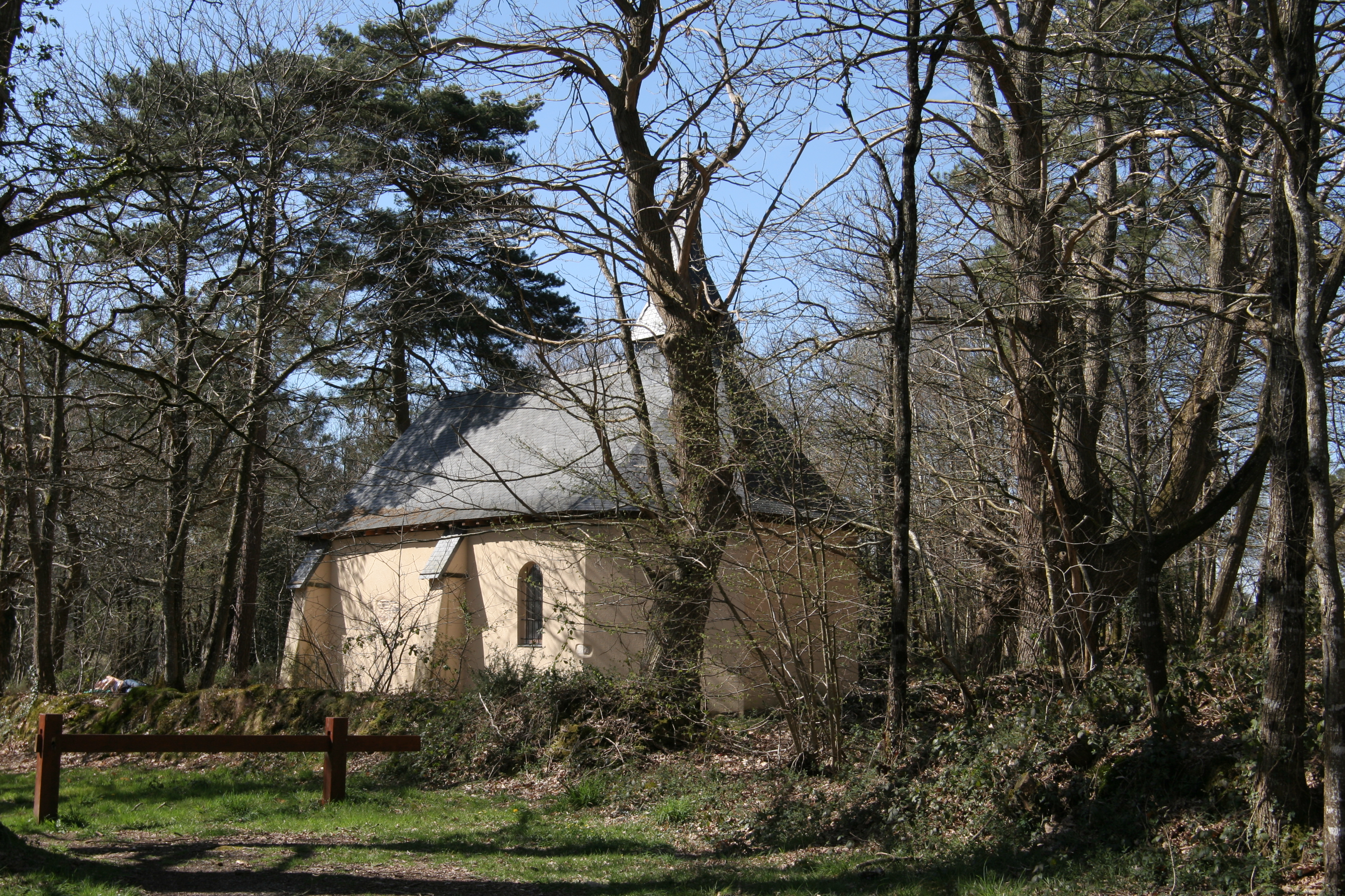 Chapelle frairienne Notre-Dame-du-Désert, Laillé (Ille-et-Vilaine, Bretagne, France).